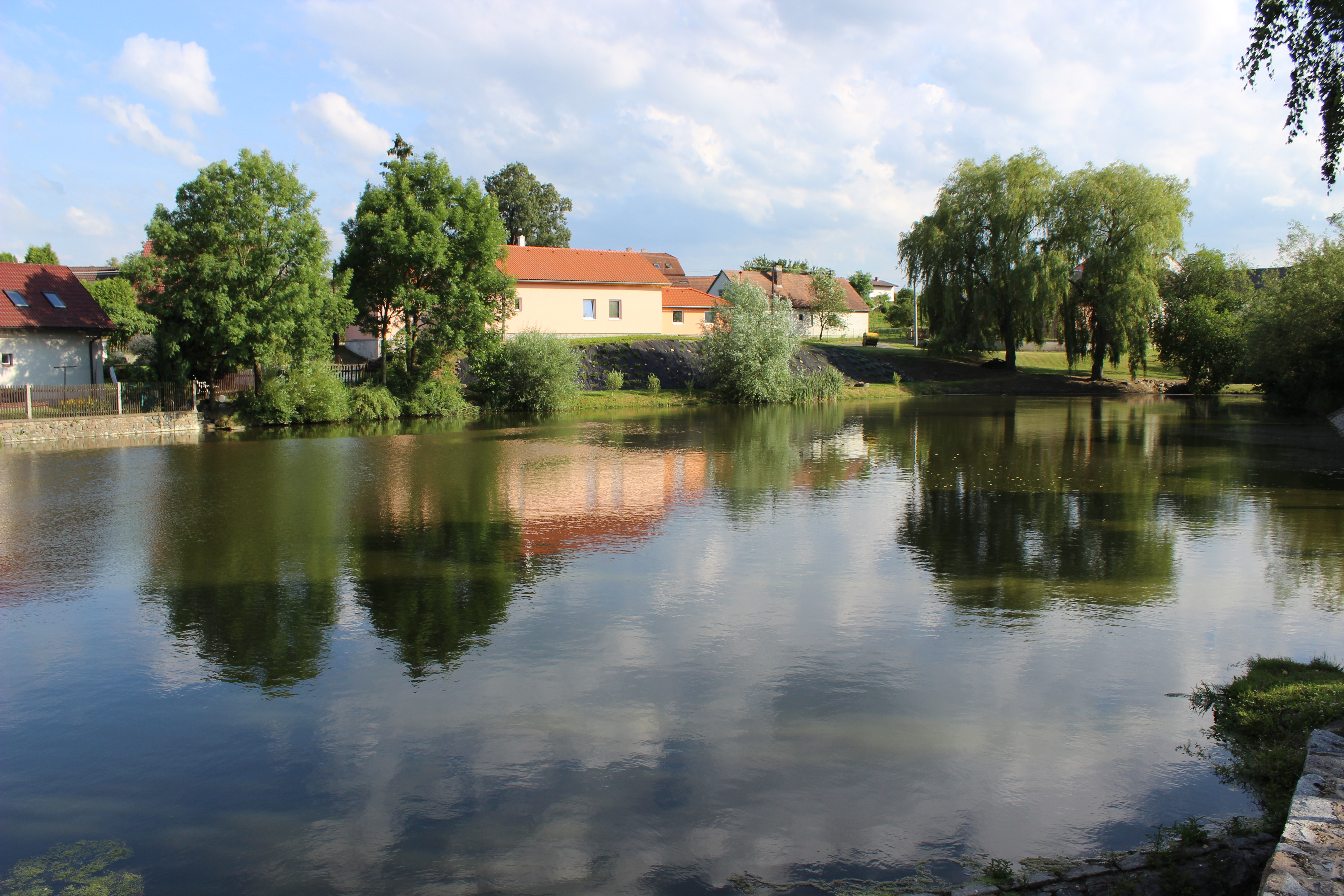 Dům s rybníkem v Brzoticích, části Lokte v benešovském okrese.